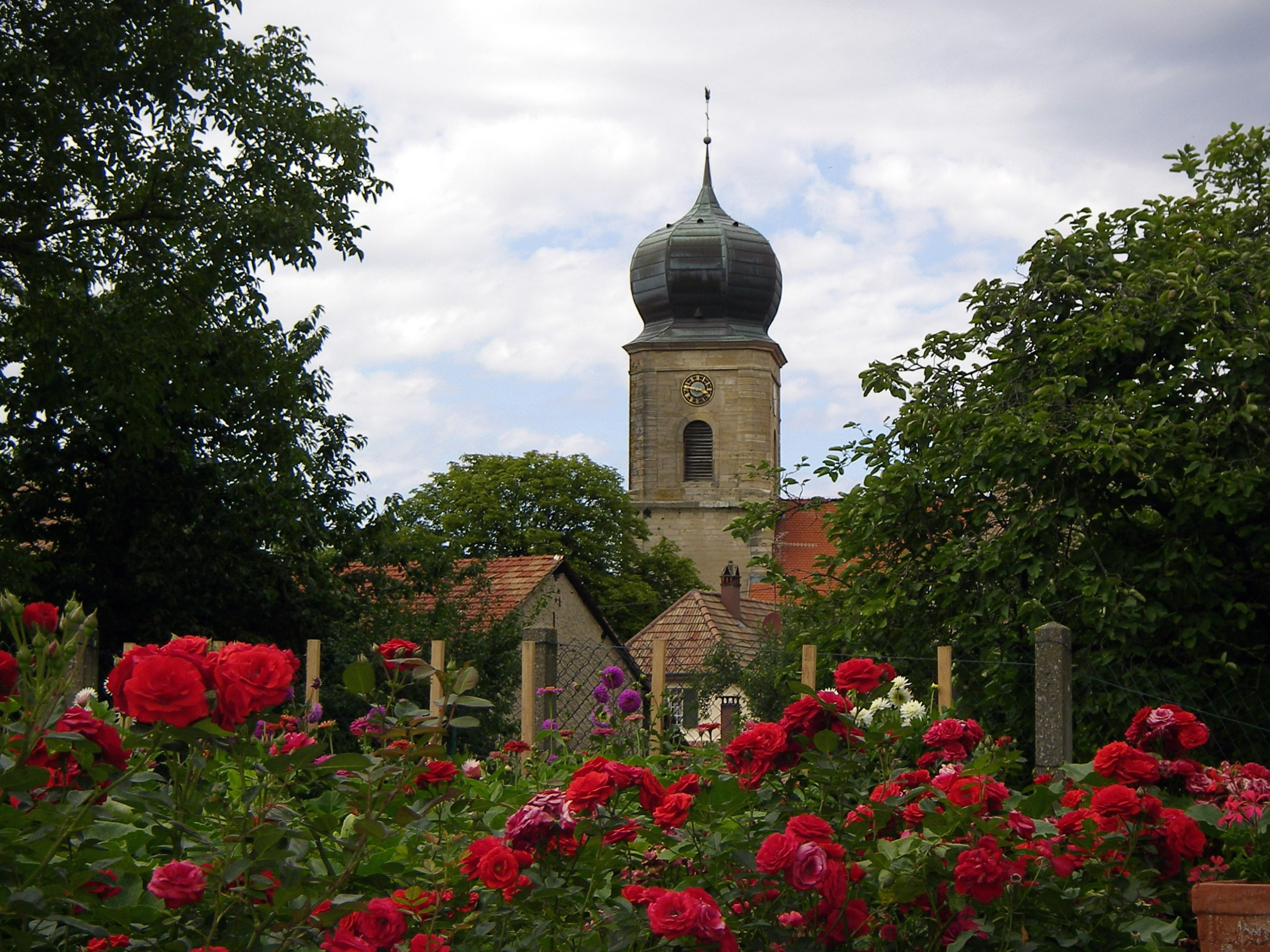 Bernwiller (Haut-Rhin, France)